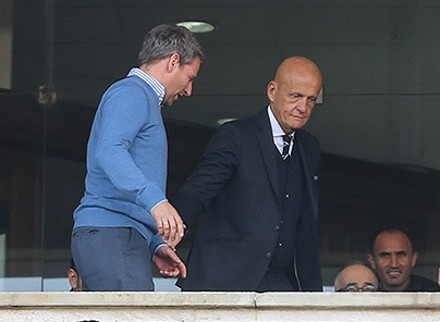 پیروزی پرسپولیس در برابر استقلال در دربی تهران